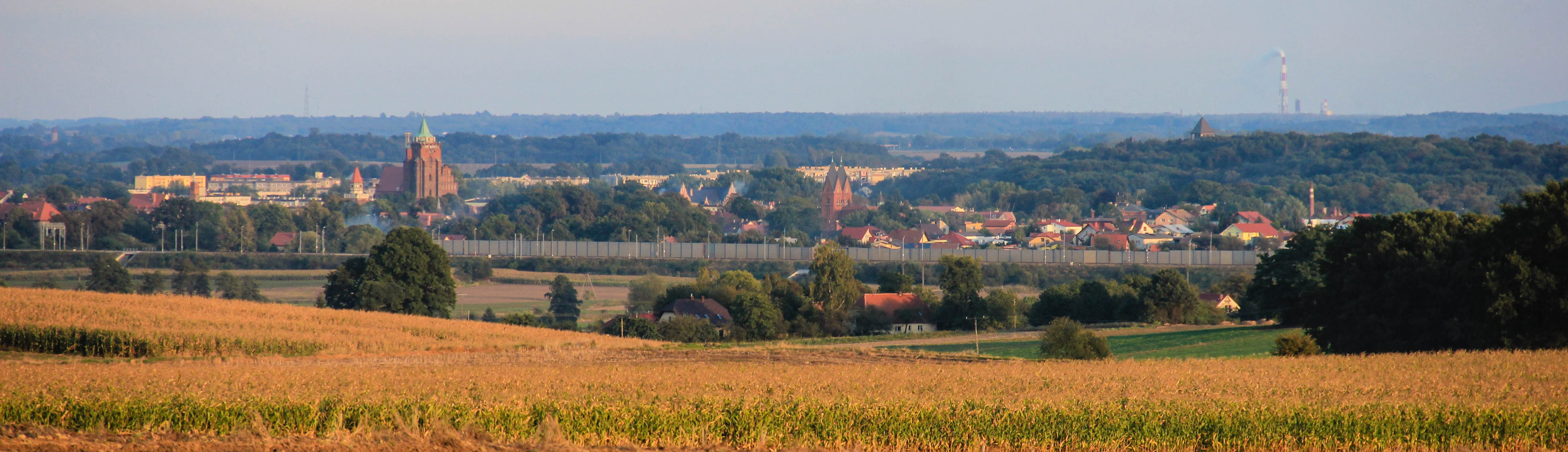 Panorama Chojnowa ze wzgórza w Jerzmanowicach